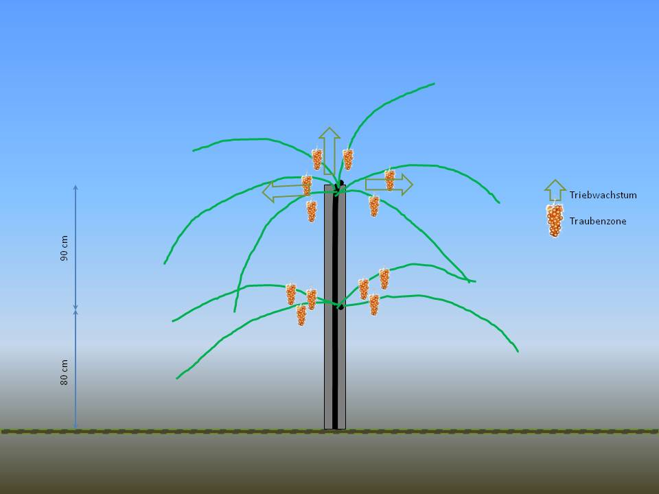 Etagenerziehung mit 4 Armen - Triebverteilung